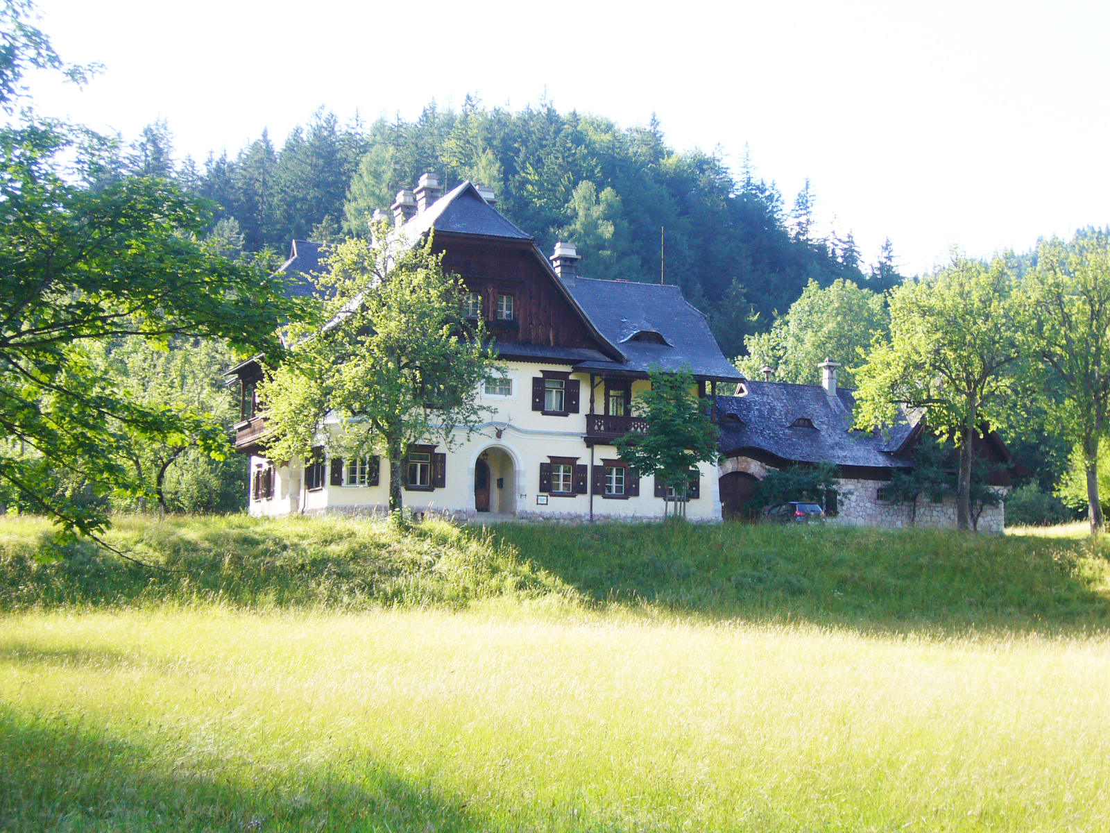 rothschildhaus